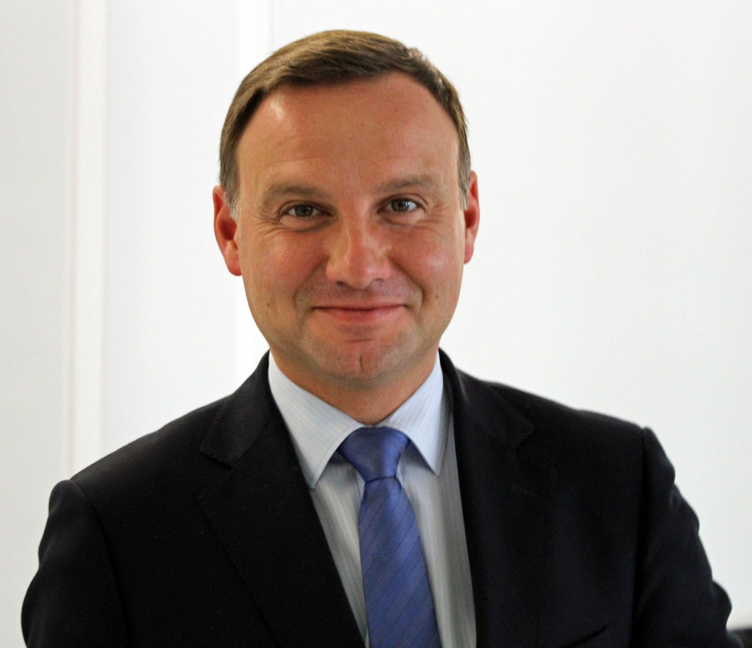 Andrzej Duda